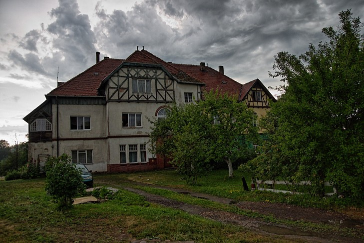 Swochowo - dwór, obecnie dom nr 3, XVIII, XIX